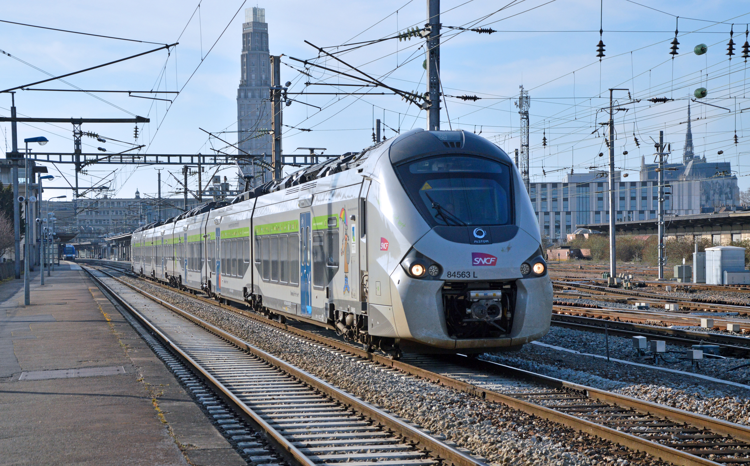 Rame Régiolis B84563/64 loué à Intercité sur la liaison Paris-Nord/Amiens/Boulogne